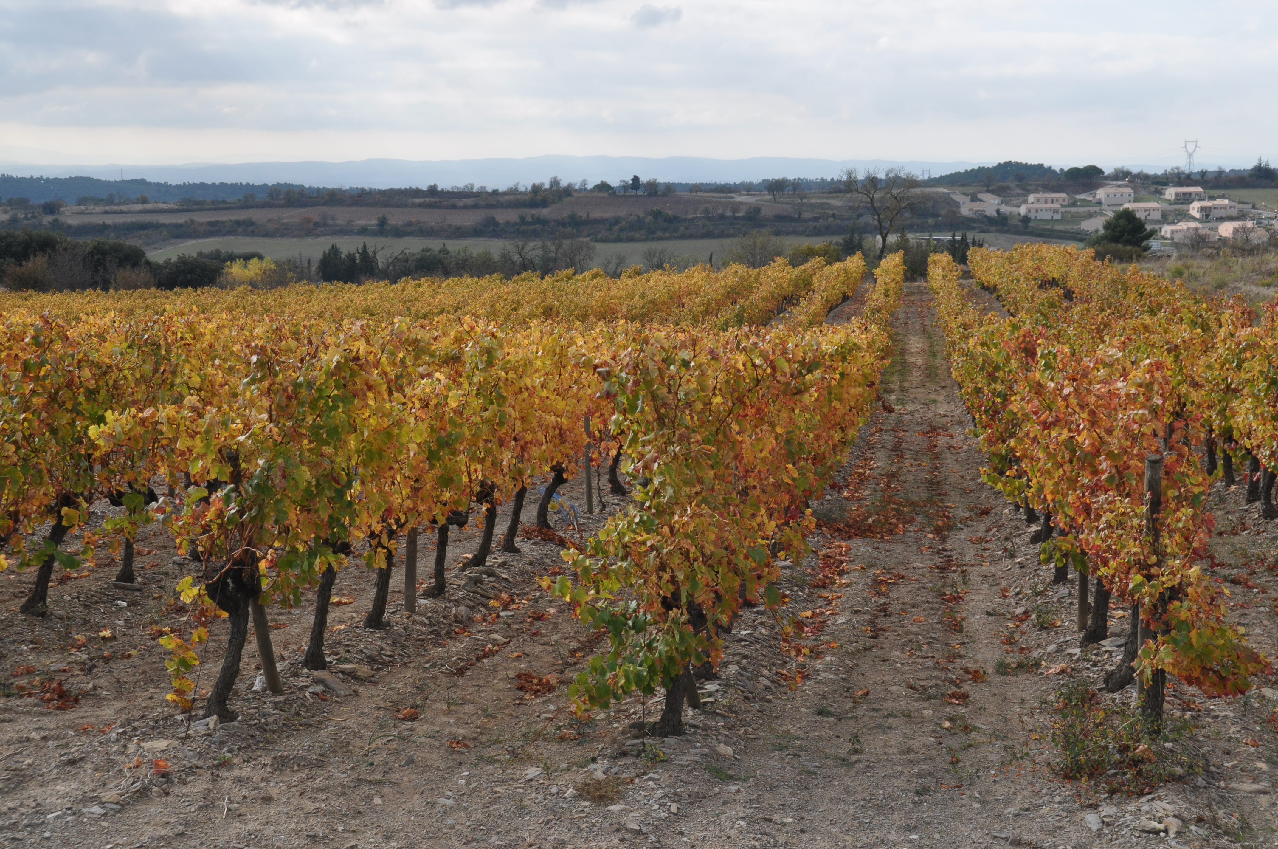 Parcelle de vigne (mois de novembre)